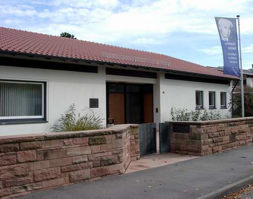 Theodor Heuss Haus Stuttgart 2004